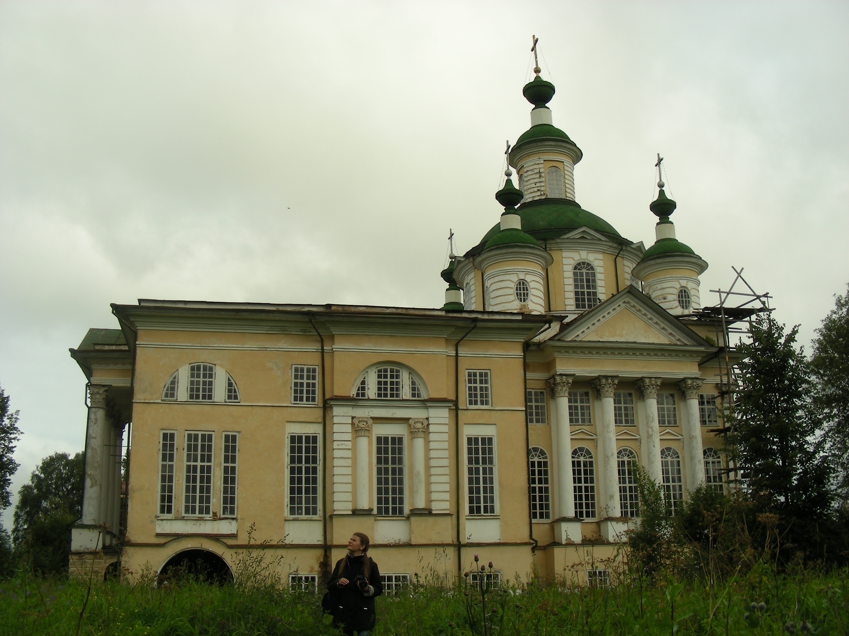 Спасо-Суморин монастырь в Тотьме. Собор Вознесения Господня